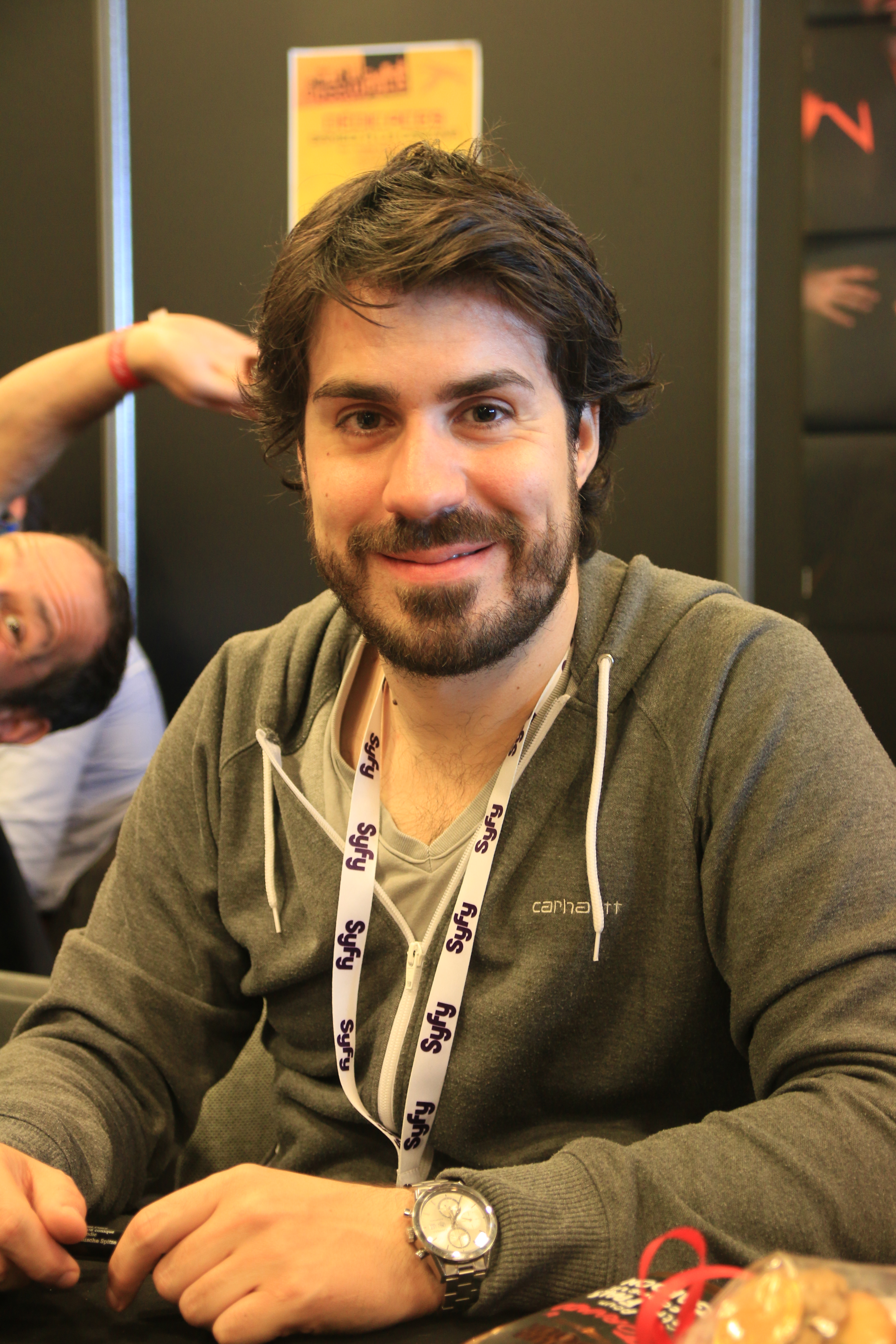 Le comédien Simon ASTIER lors de Geekopolis 2014